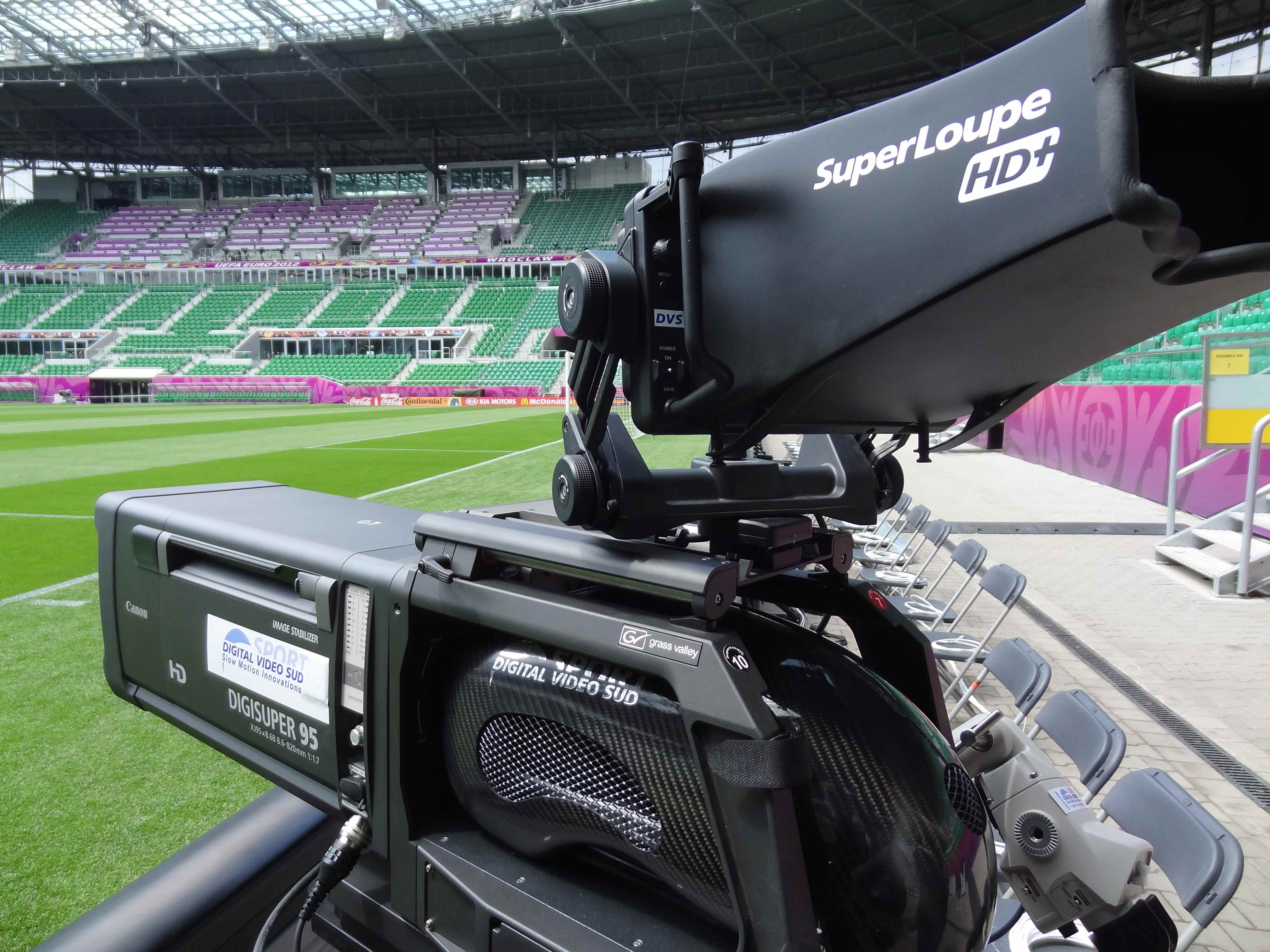 La Superloupe HD+